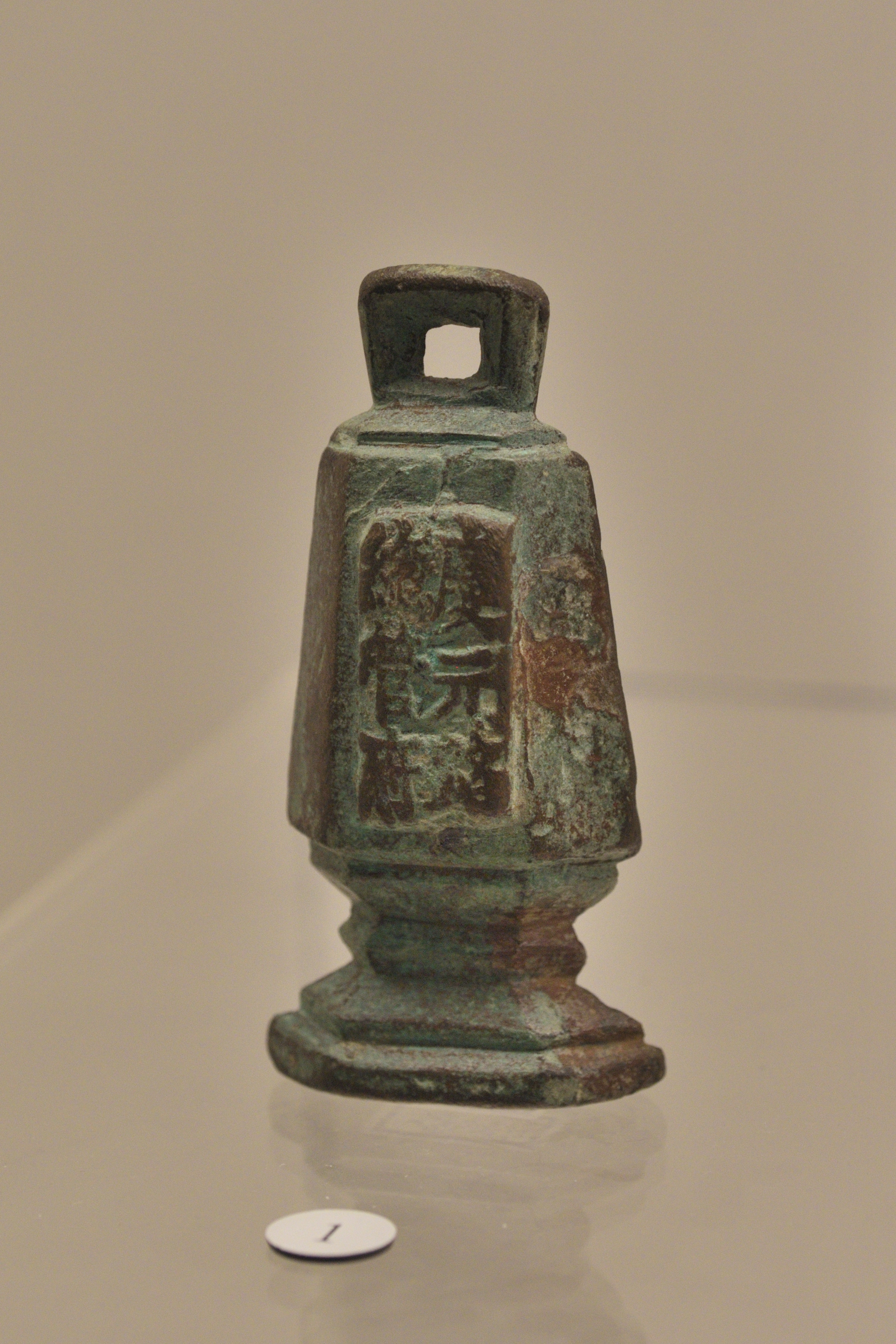 宁波博物馆藏庆元路总管府印